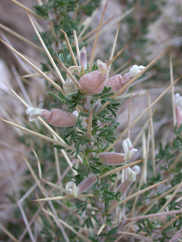 Astragalus spinosus (Forssk.) Muschl. (קדד משולחף), Northern Negev, Israel, December 30, 2006.